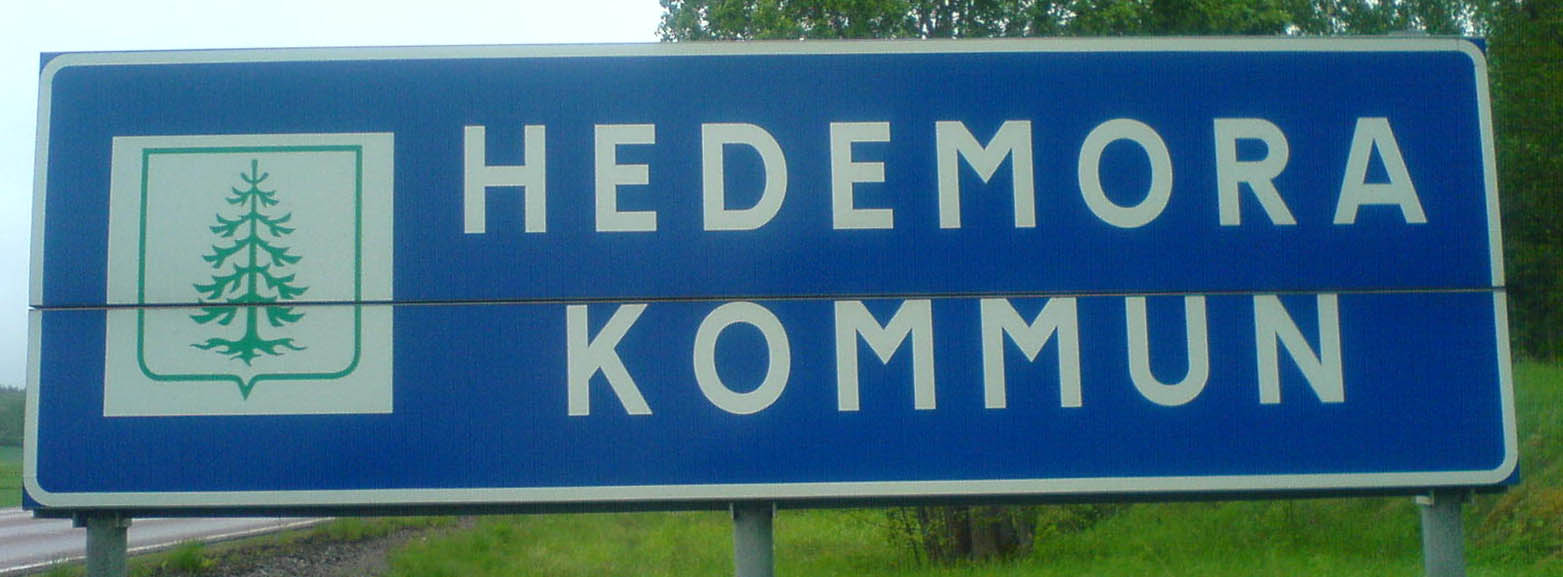 Hedemora kommuns skylt på gränsen mot Säters kommun på LV266